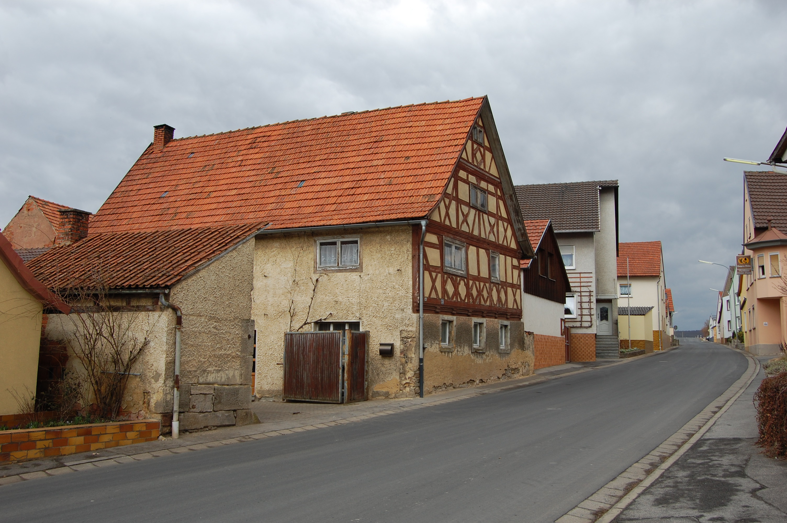 Wollbach (Unterfranken), Ortsansicht (2011)